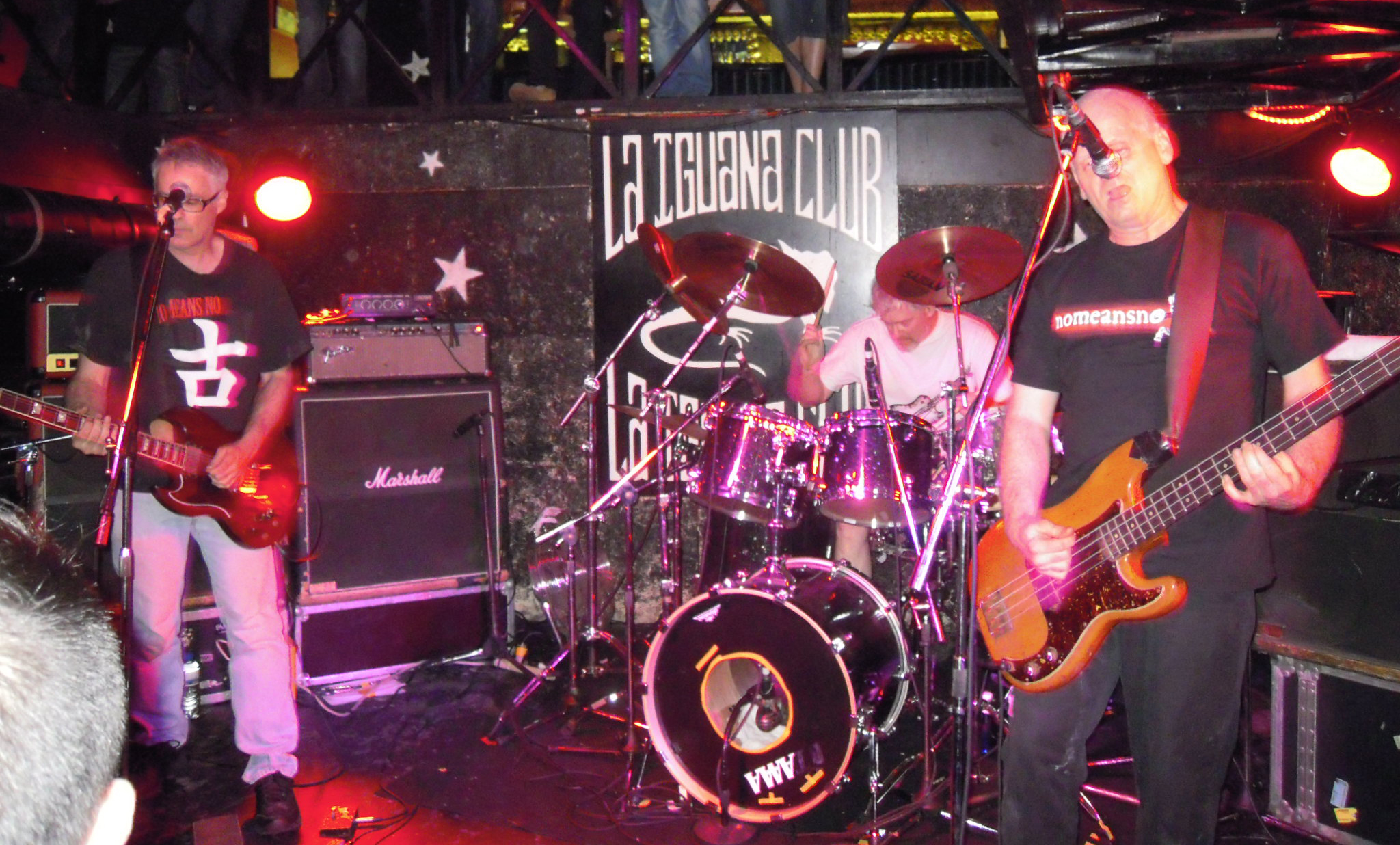 NoMeansNo en concerto na sala La Iguana de Vigo NoMeansNo